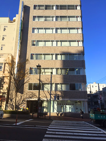 インボディ東京本社